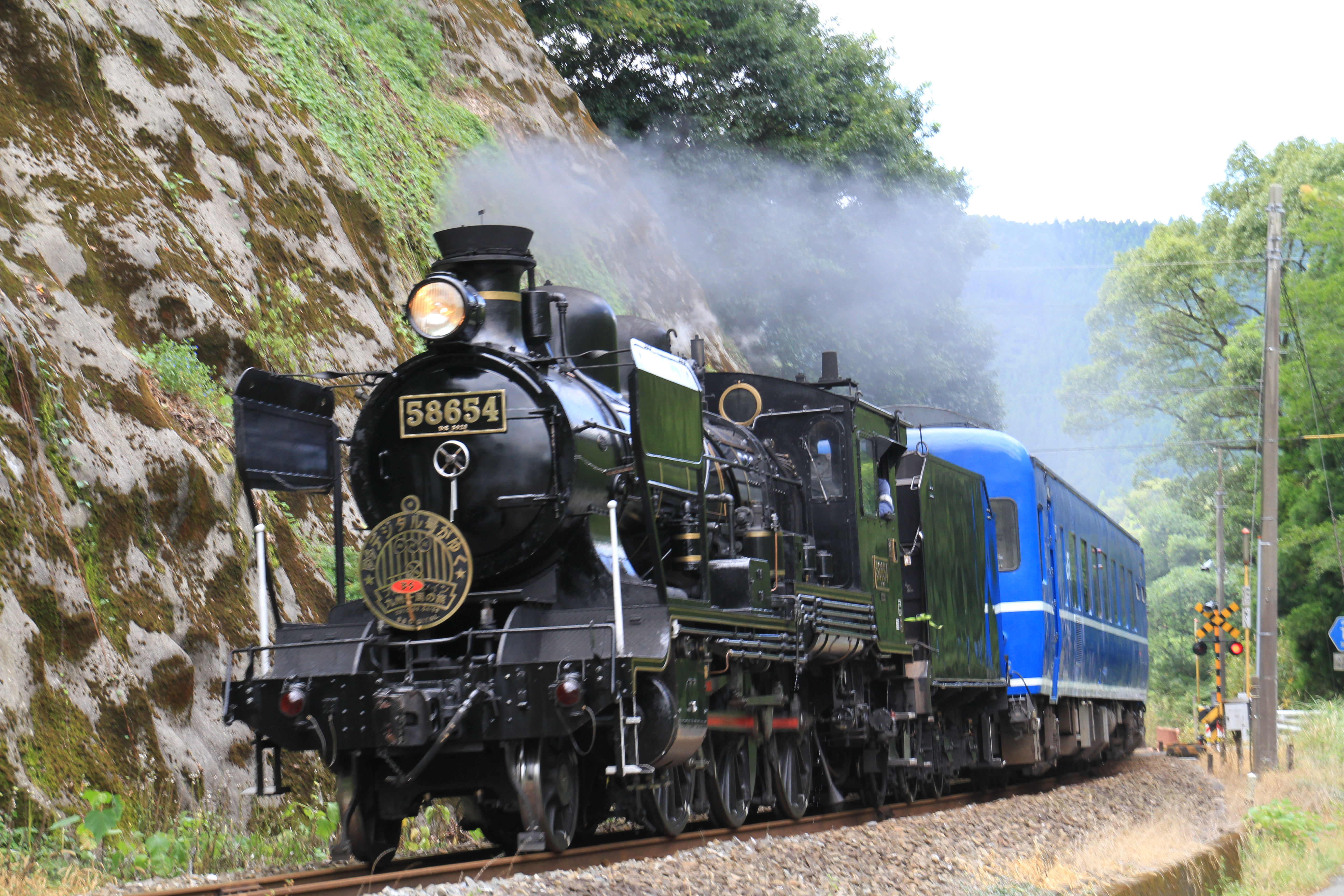 BSデジタル号@那良口～渡その3